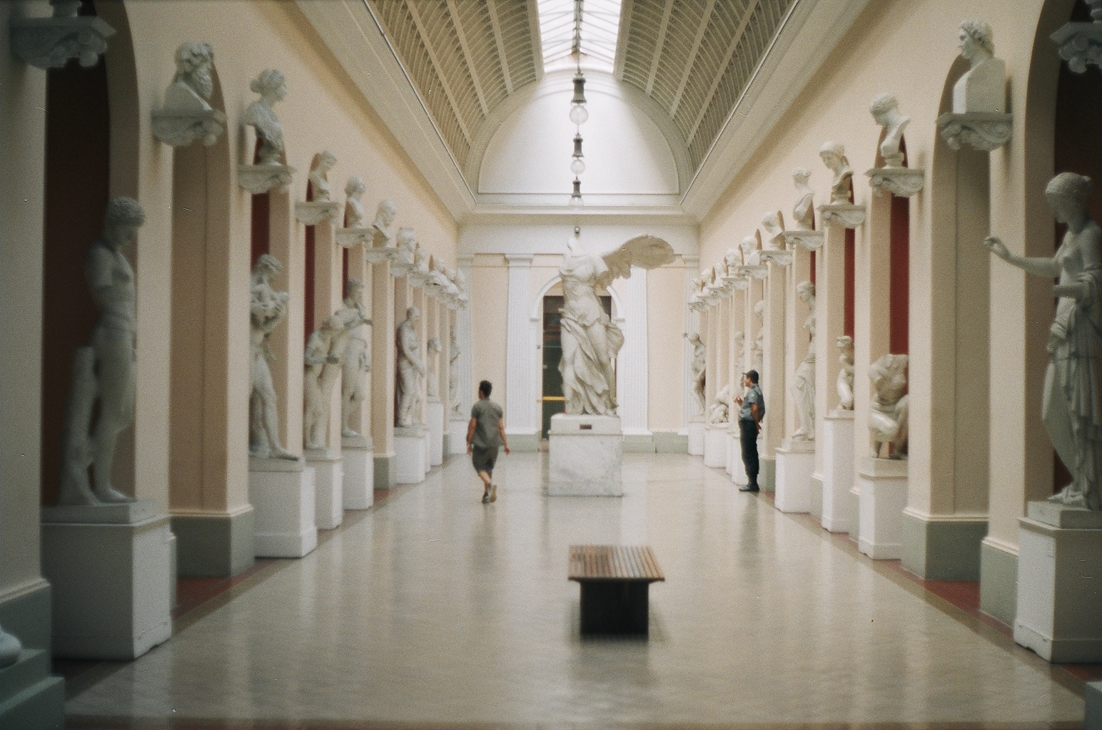 Museu Nacional de Belas Artes (RJ).